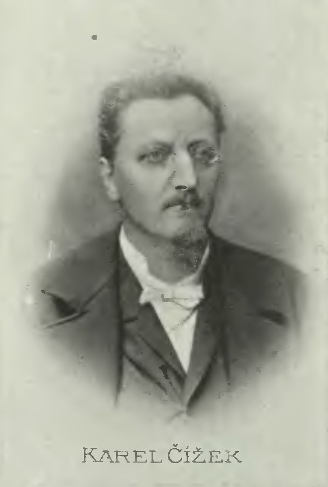 Portrét – Karel Čížek (1833-1894), Český politik.